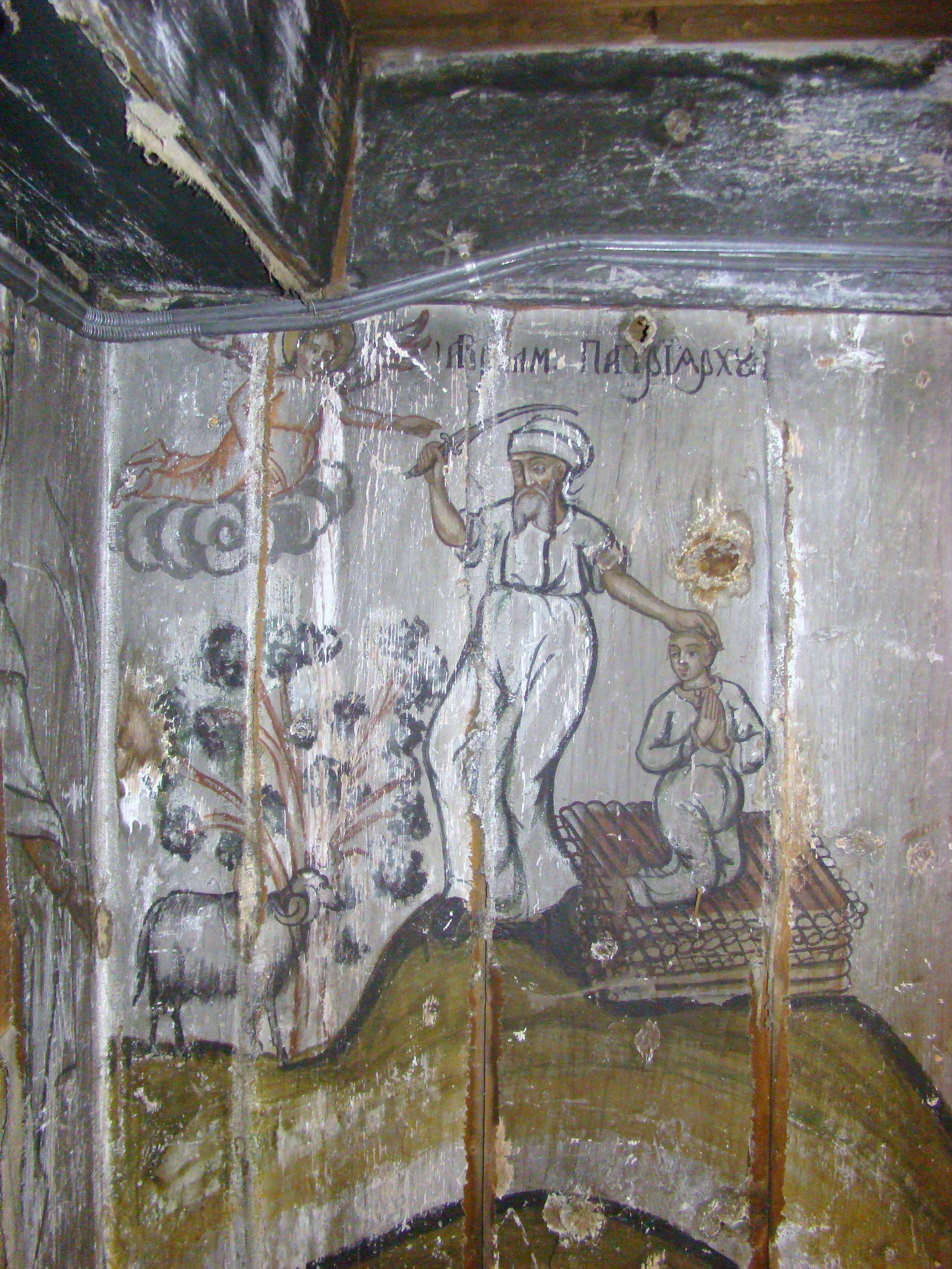 Biserica de lemn "Sfântul Dumitru" , sat DUBEŞTI; comuna OHABA LUNGĂ